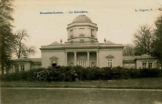 le château du Belvedere à Laeken. construit en 1788 par l'architecte tournaisien Auguste Payen. Agrandit et surélevé ultérieurement.